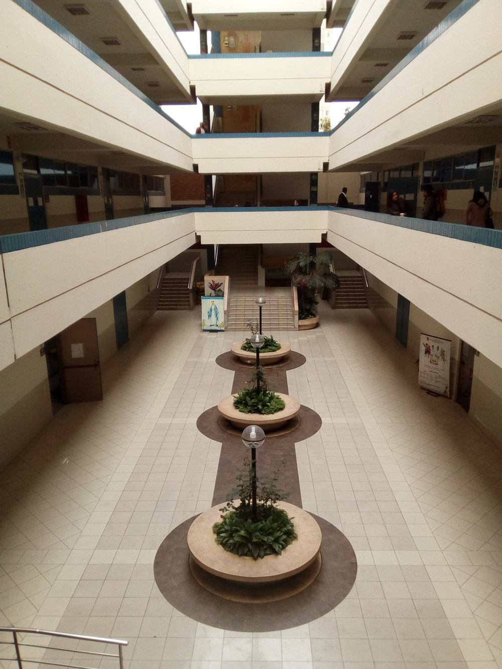 Interior de la Facultad de Derecho y Ciencias Políticas de la UIGV